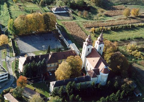 Nagykapornak, Hungary, aerialphotography